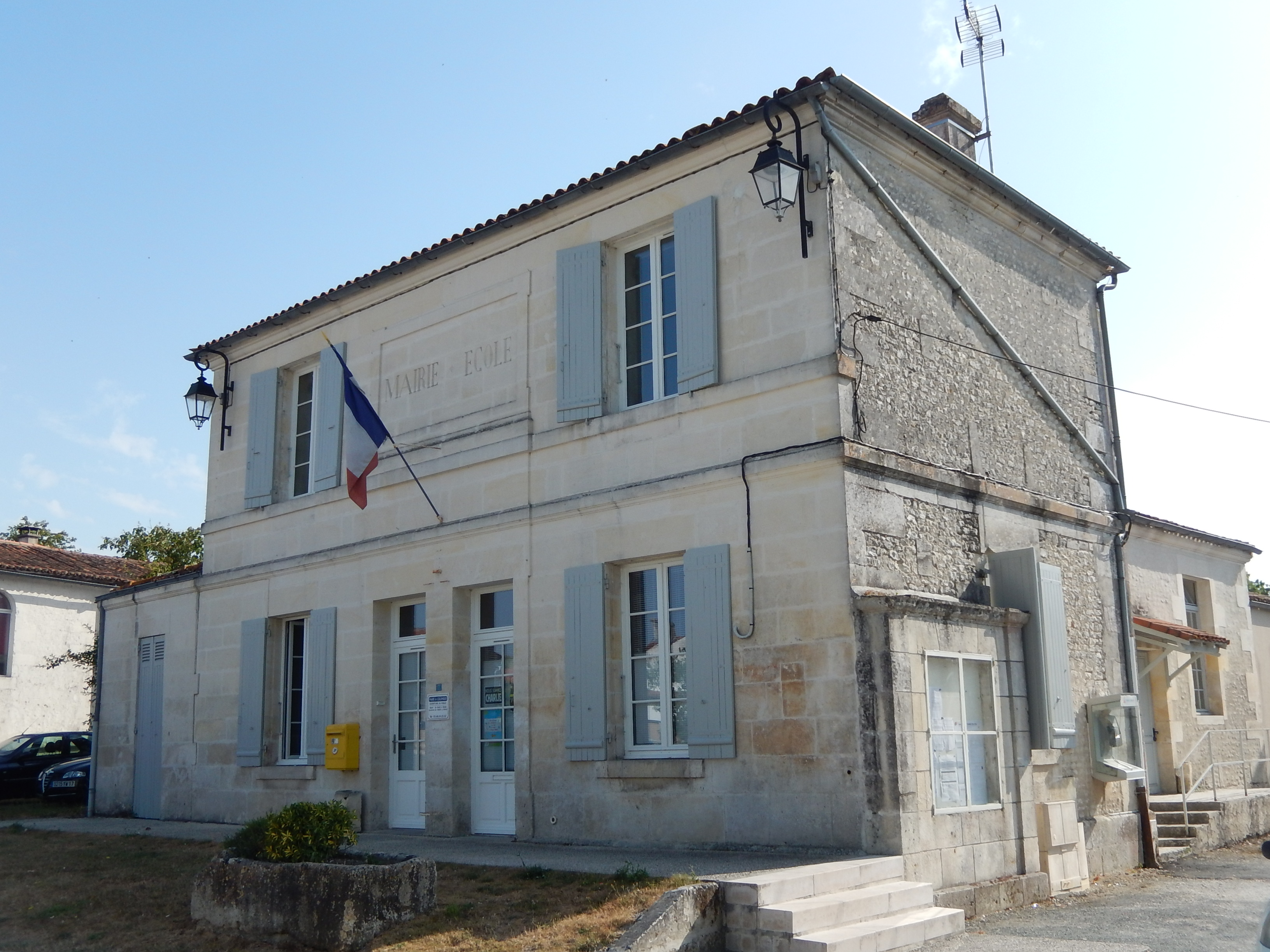 Commune de Colombiers, Charente-Maritime, France — La mairie de Colombiers, située dans l'ouest du village.